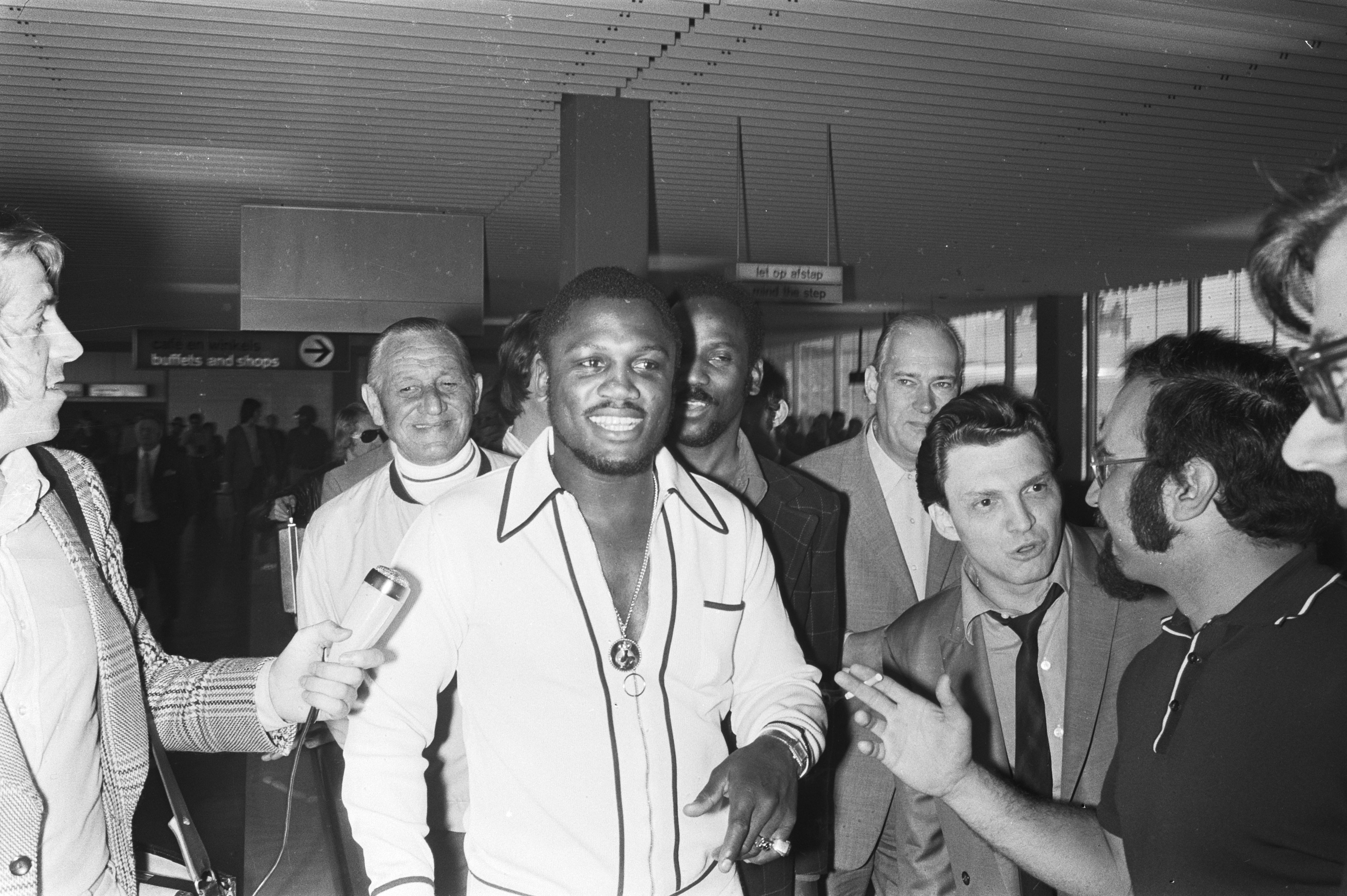 Collectie / Archief : Fotocollectie Anefo Reportage / Serie : [ onbekend ] Beschrijving : Aankomst van Joe Frazier op Schiphol Datum : 15 mei 1971 Locatie : Noord-Holland, Schiphol Trefwoorden : aankomst en vertrek, musici, vliegvelden Persoonsnaam : Frazier, Joe Fotograaf : Peters, Hans / Anefo Auteursrechthebbende : Nationaal Archief Materiaalsoort : Negatief (zwart/wit) Nummer archiefinventaris : bekijk toegang 2.24.01.05 Bestanddeelnummer : 924-5567